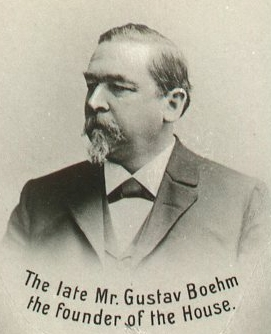 Firmenleiter der Gustav Boehm Toilettenseifen- und Parfumeriefabrik Offenbach